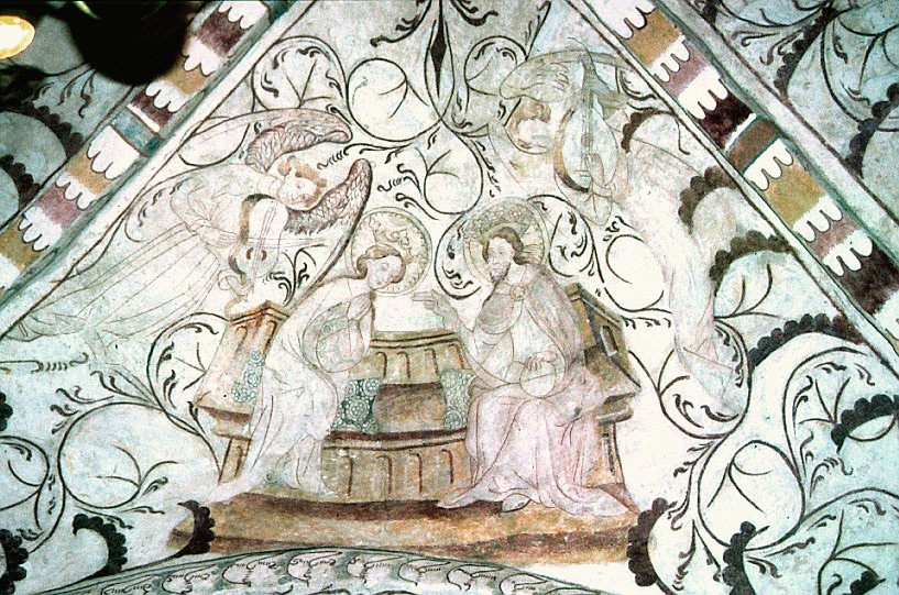 Nødebo Kirke i Danmark. Skib vestfag østkappe, Marias himmelkroning